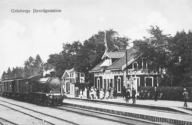 Gräsberg station på 1920-talet, stationen öppnad för trafik 31 december 1875